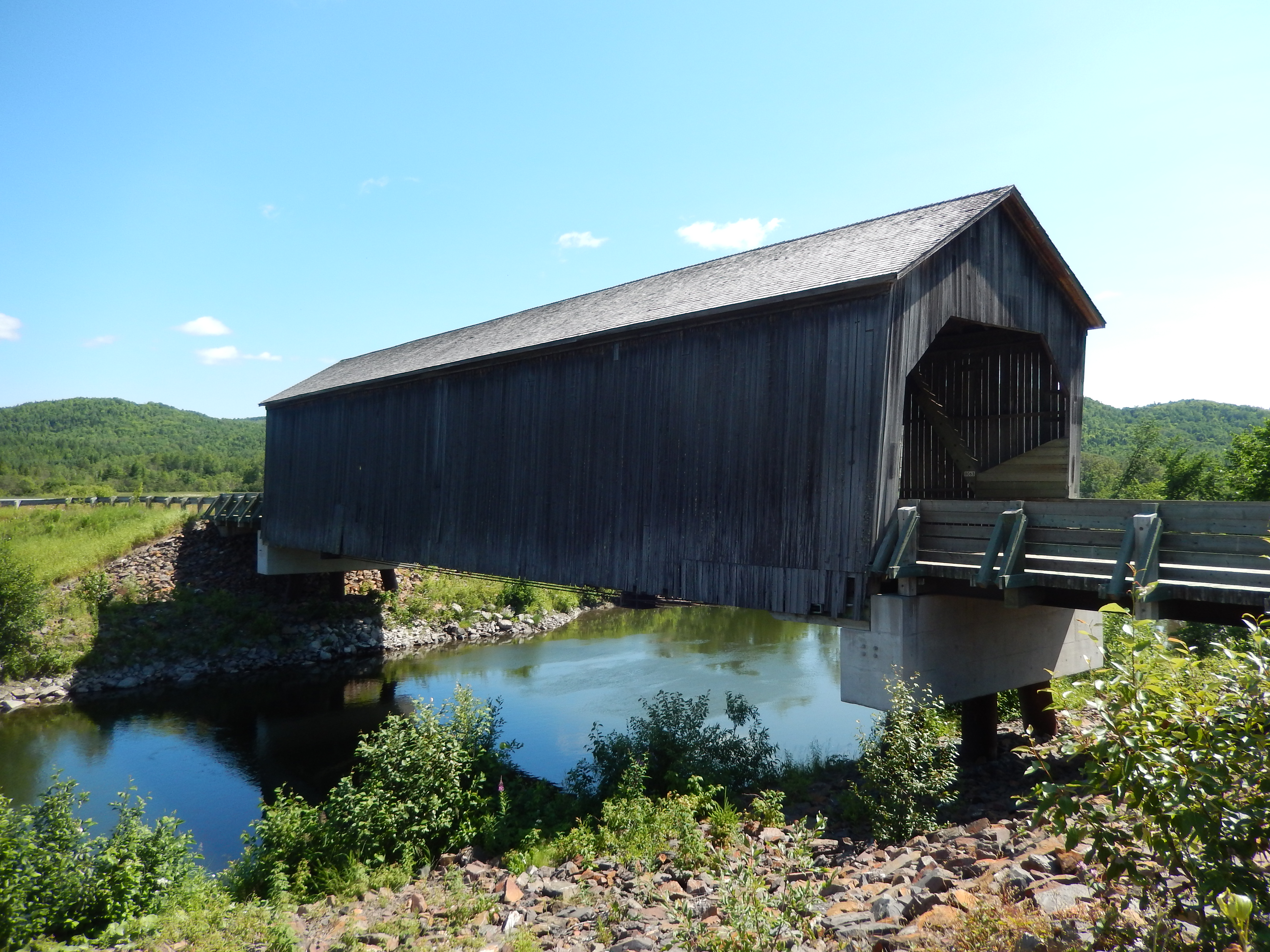 Pont du ruisseau Baker No 2, construit en 1939